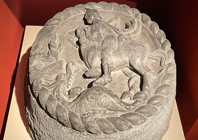 Clé de voûte du palais des Gouverneurs de Bastia en ardoise de Lavagna représentant Saint-Georges, symbole de la République de Gênes. 16e siècle. Musée de Bastia.